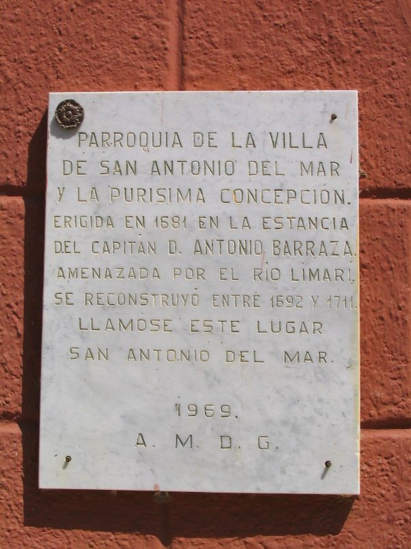 Placa recordatoria en iglesia San Antonio del Mar y la Purísima Concepción Barraza, Chile, memorial plate in San Antonio del Mar y la Purísima Concepción church. Source: photographed by myself 2004:02:02 16:08:05 Photographer: Zuirdj Licence: Public Domain Description